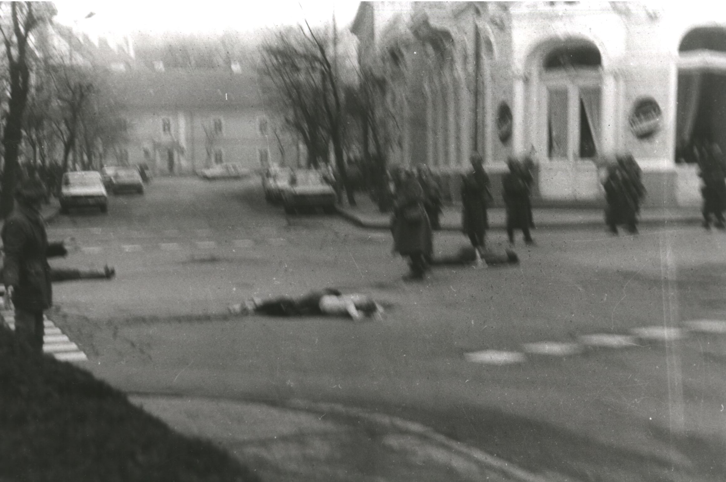 Această poză a fost realizată de către Răzvan Rotta în zilele revoluţiei din 1989. Cătălin Bogdan a cerut acestuia să transmită în domeniu public cele 21 de poze iar dânsul şi-a dat acordul; ulterior acest acord de publicare a fost trimis confirmat către d-nul Rotta, pe data de 5 aprilie 2010, la adresa - vezi tichetul 2010032110014341)